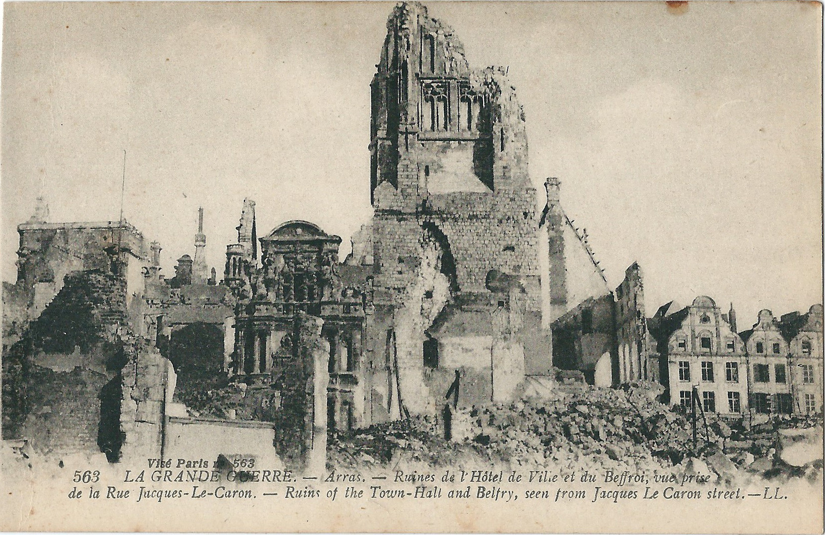 Carte postale d'Arras (Pas-de-Calais, France) , ravagé par les bombardements de la Première guerre mondiale (en 1914 & 1915, selon les lieux)